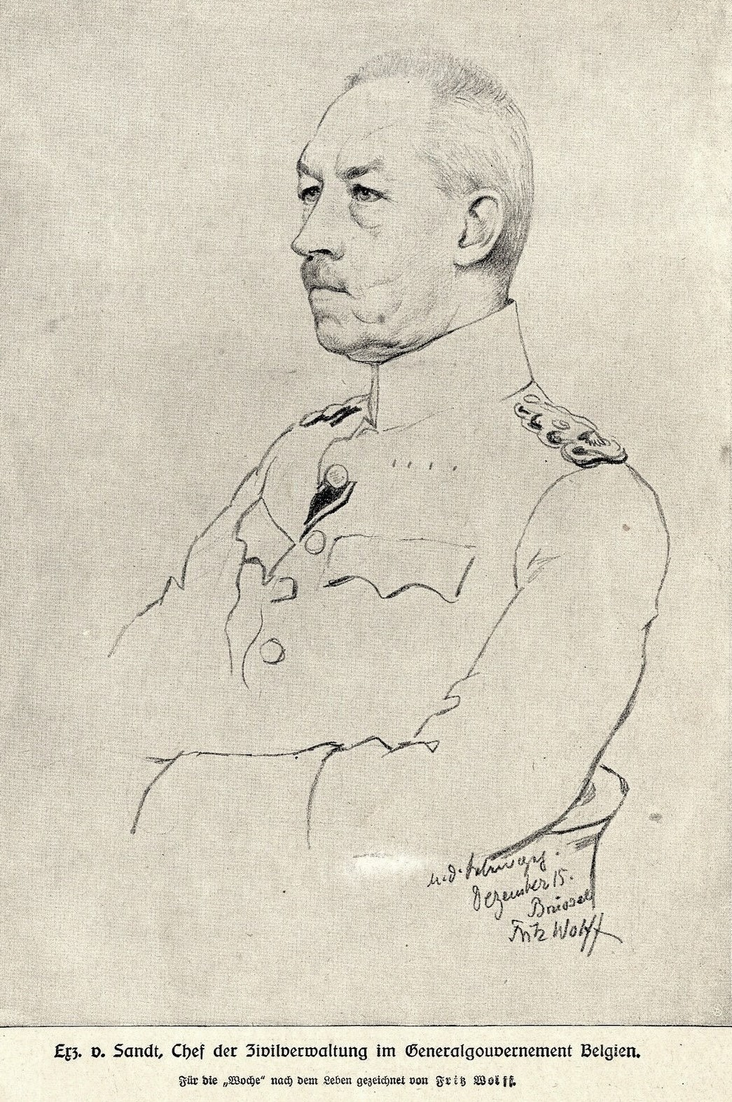 Max von Sandt Chef der Zivilverwaltung im Generalgouvernement Belgien